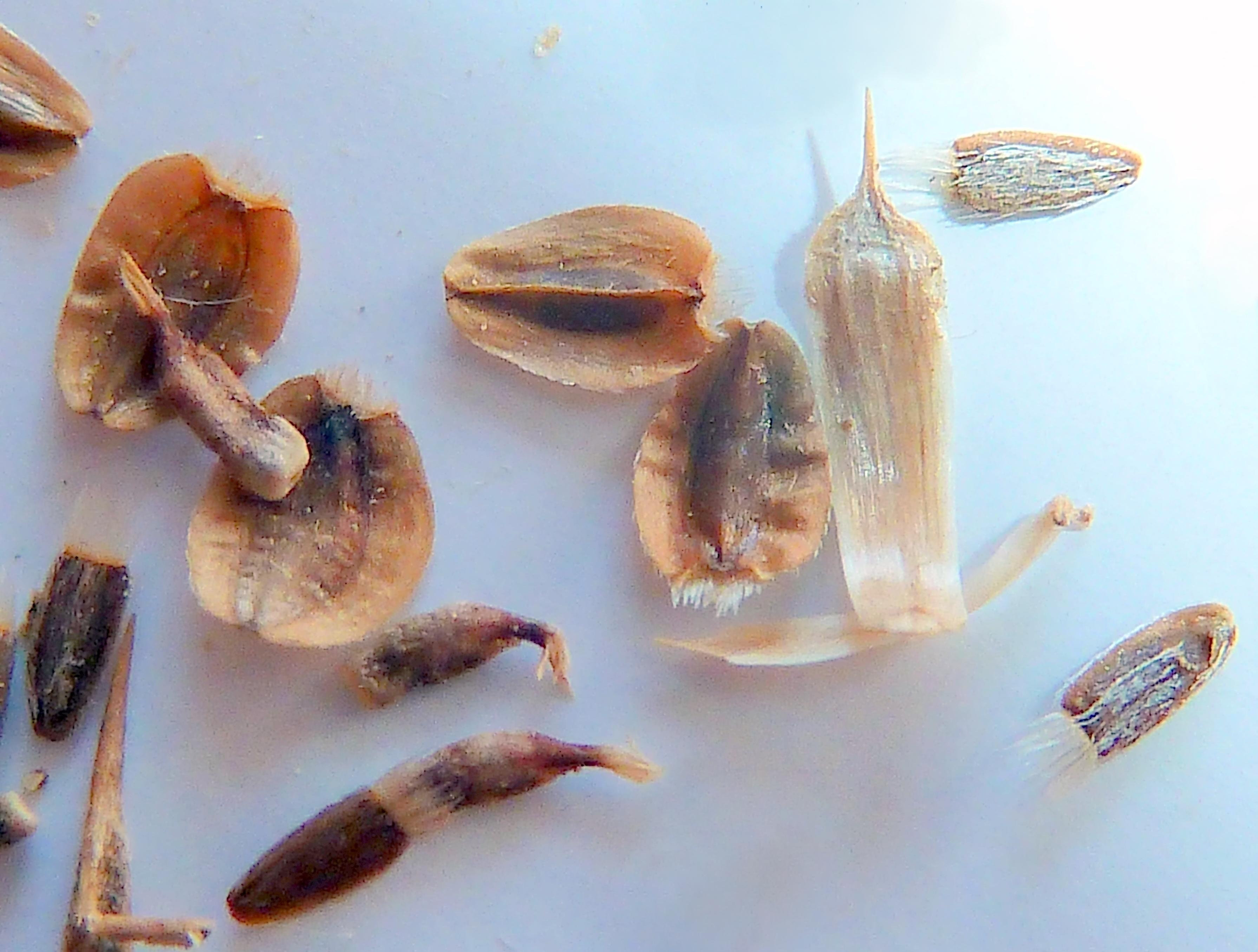 Pallenis spinosa (Castañuela) - Frutos externos e internos (con pálea del receptáculo y bráctea involucral interna) - Águilas (Provincia de Murcia, España)